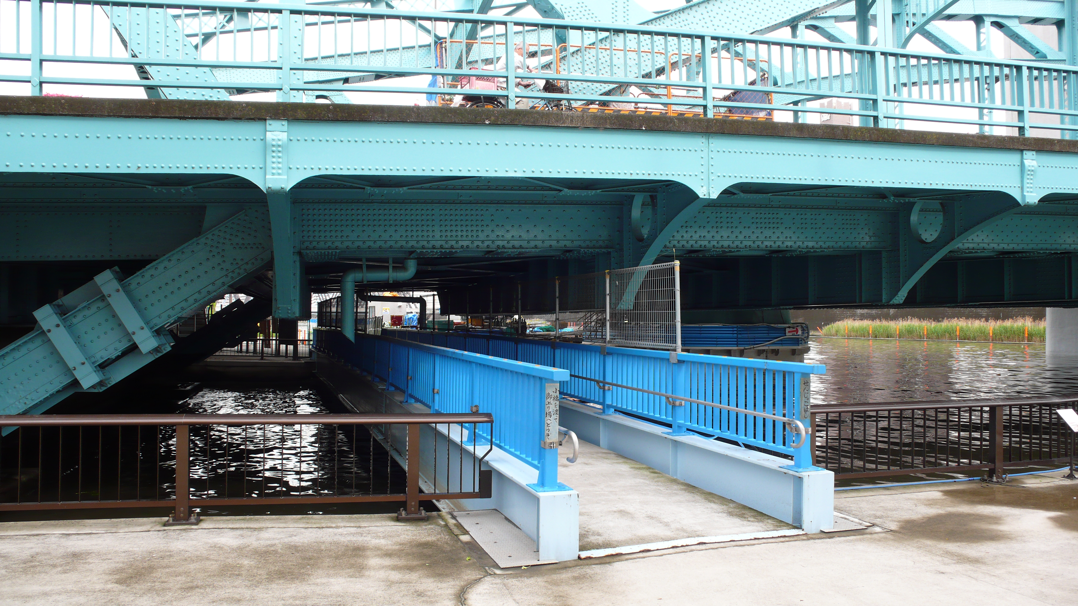 千住大橋下の千住小橋